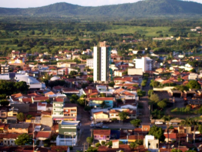 Cidade de Cajazeiras- PB